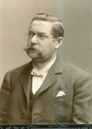 Portrait 1906